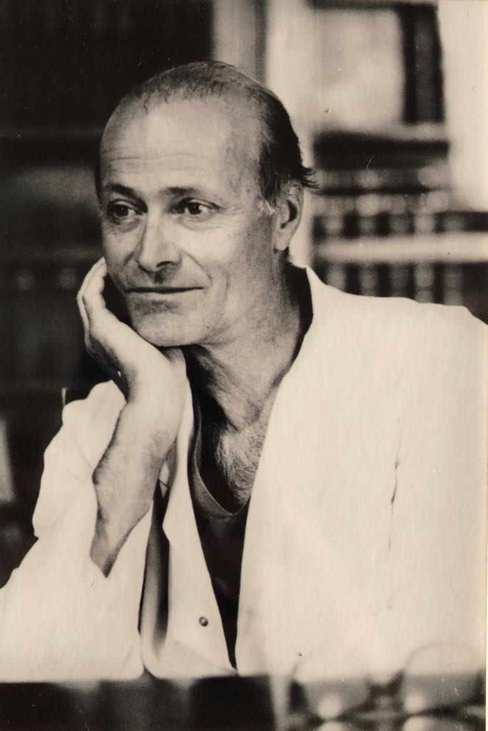 Fotoritratto di Angelo Pierangeli nel suo studio del Policlinico Sant'Orsola